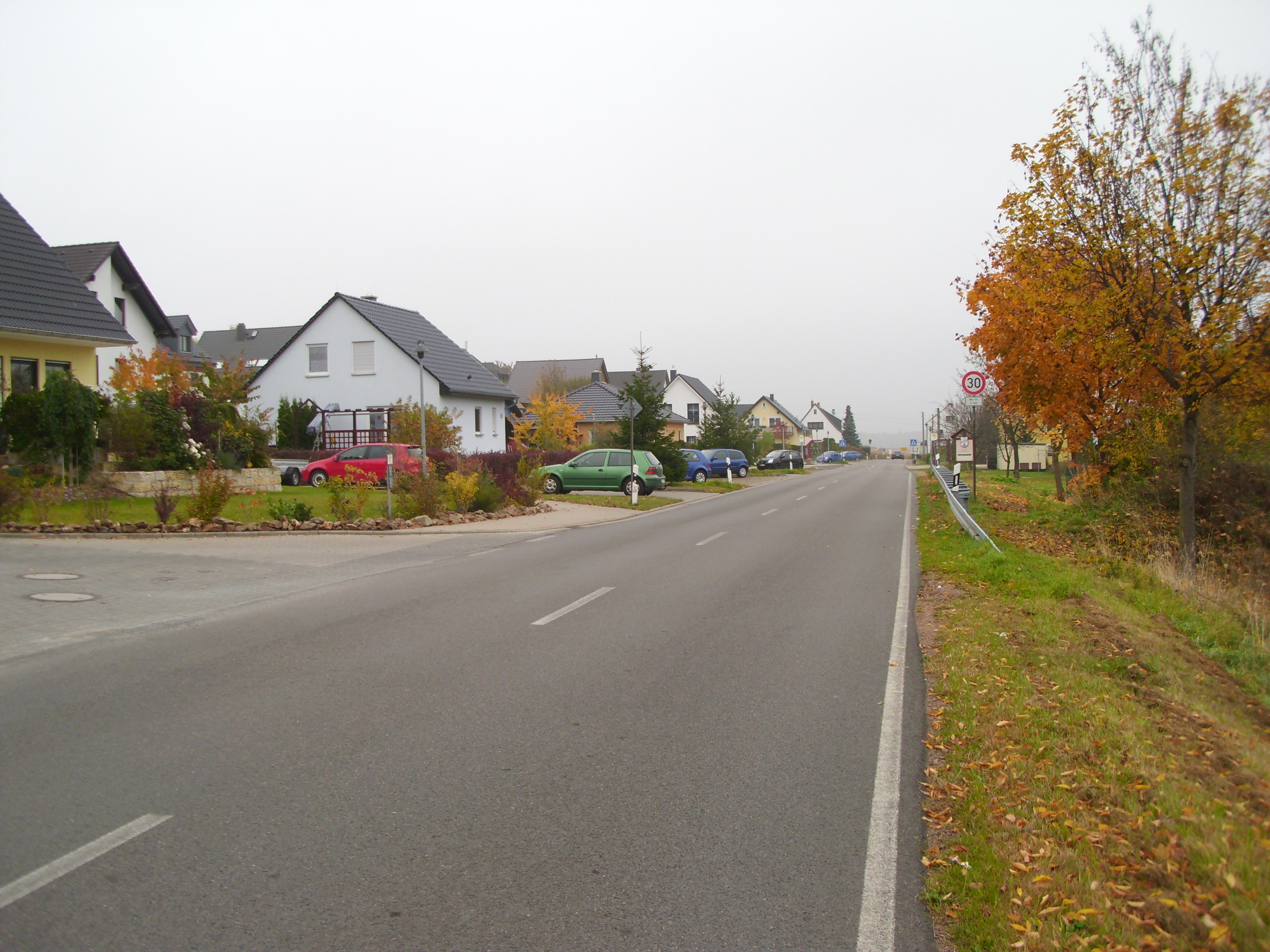 Hier entstand nach 1990 die Wohnhaussiedlung , Geierswacht. Am auf der Rechten Straßen Seite entstanden bereits Ende des 19Jh erste Häuser.